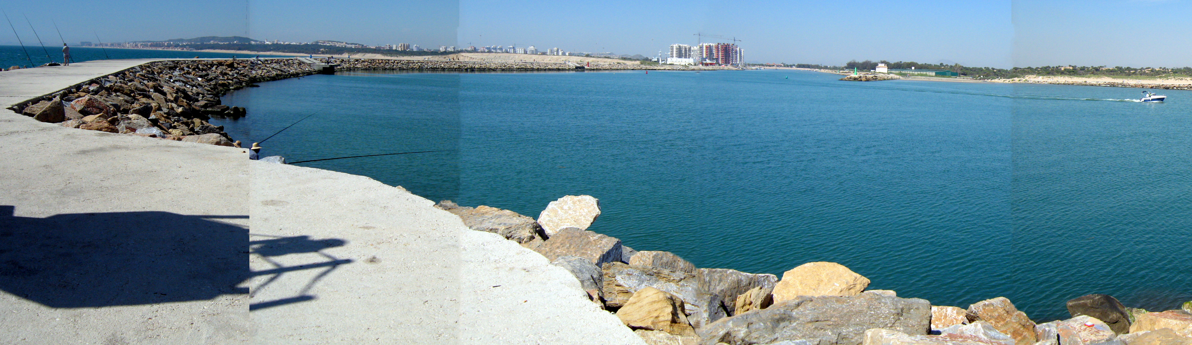 Montaje panoramico del Estuario del Río Segura en Guardamar